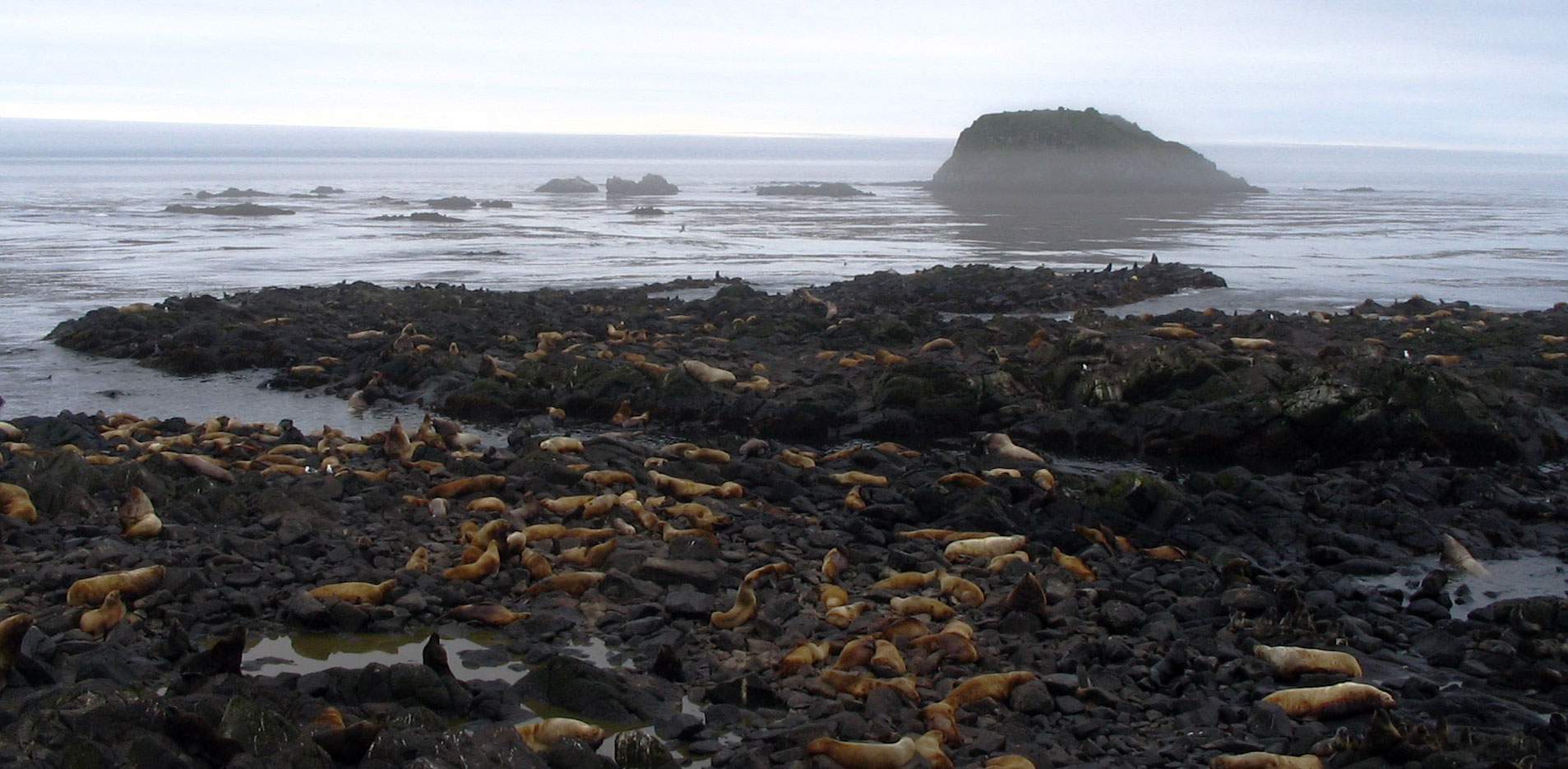 Dolgaya Rock, Lovushki Islands, Kuril Islands, Russia